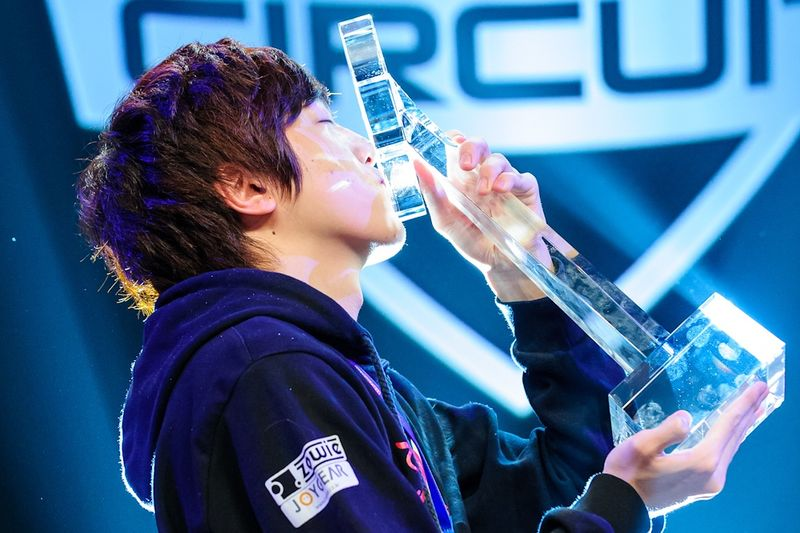 Life gagne le 2013 MLG Winter Championship